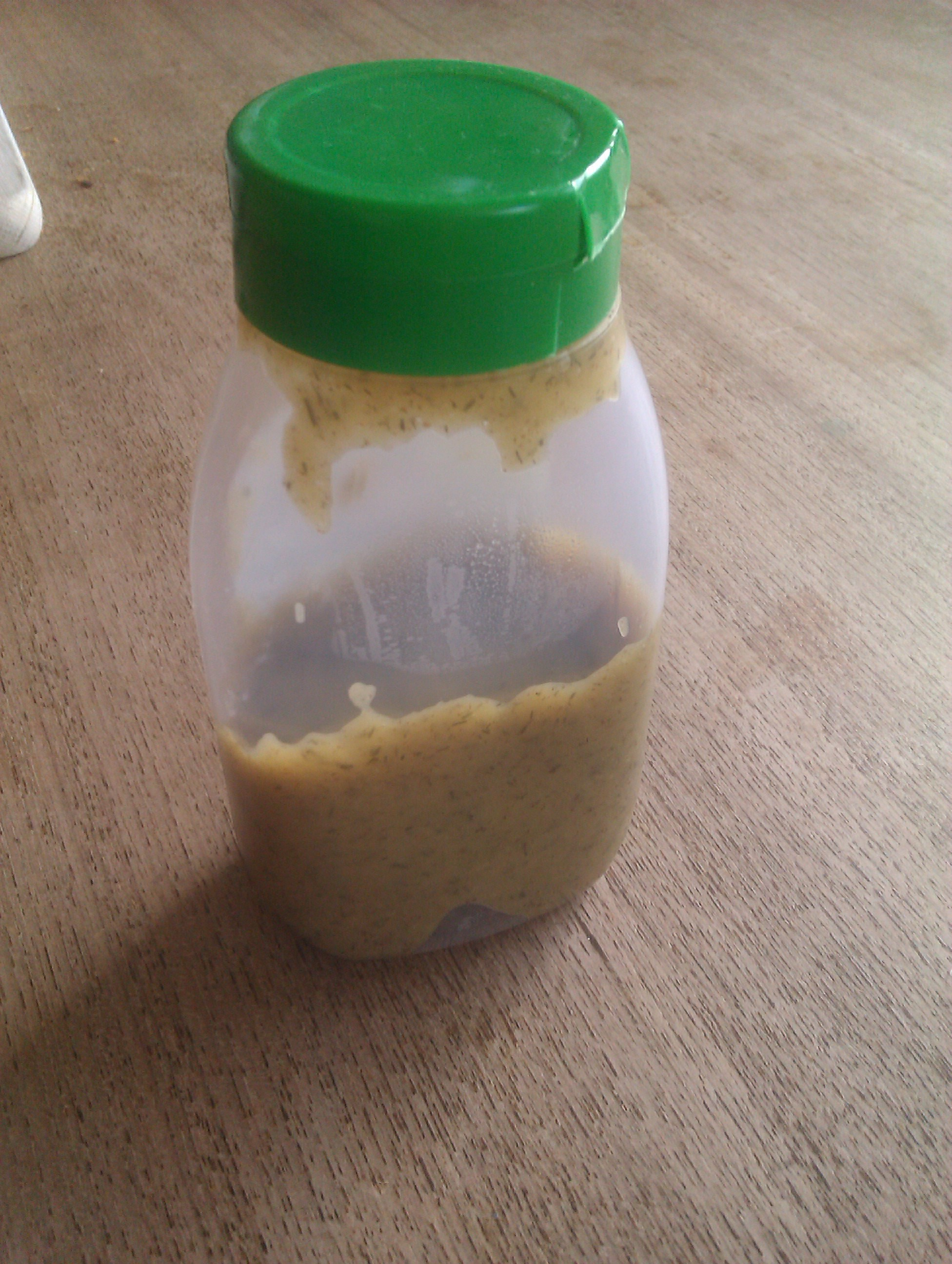 En flaske rævesovs ('dilddressing')